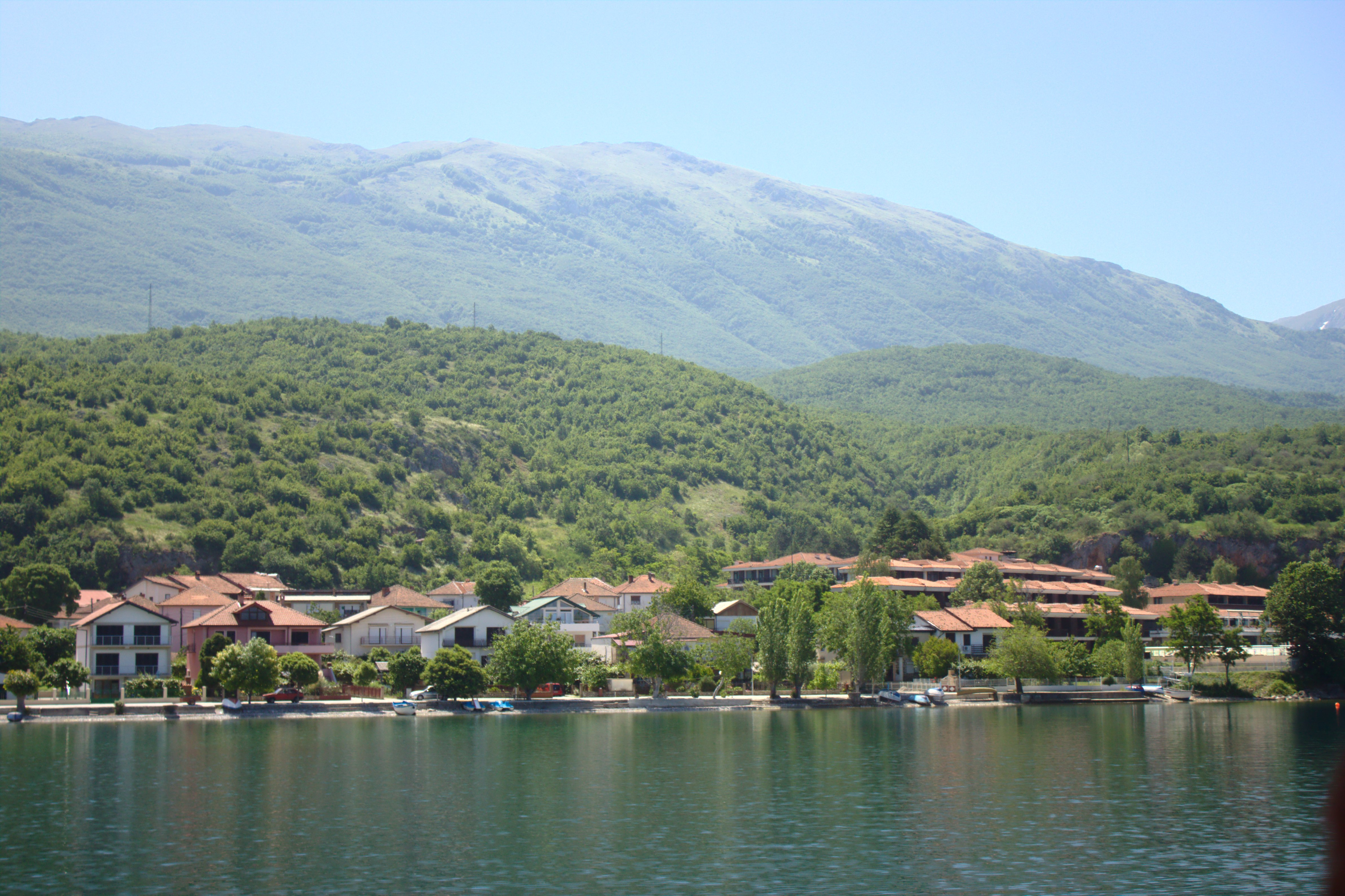 Domy v obci Peštani na jihu Severní Makedonie